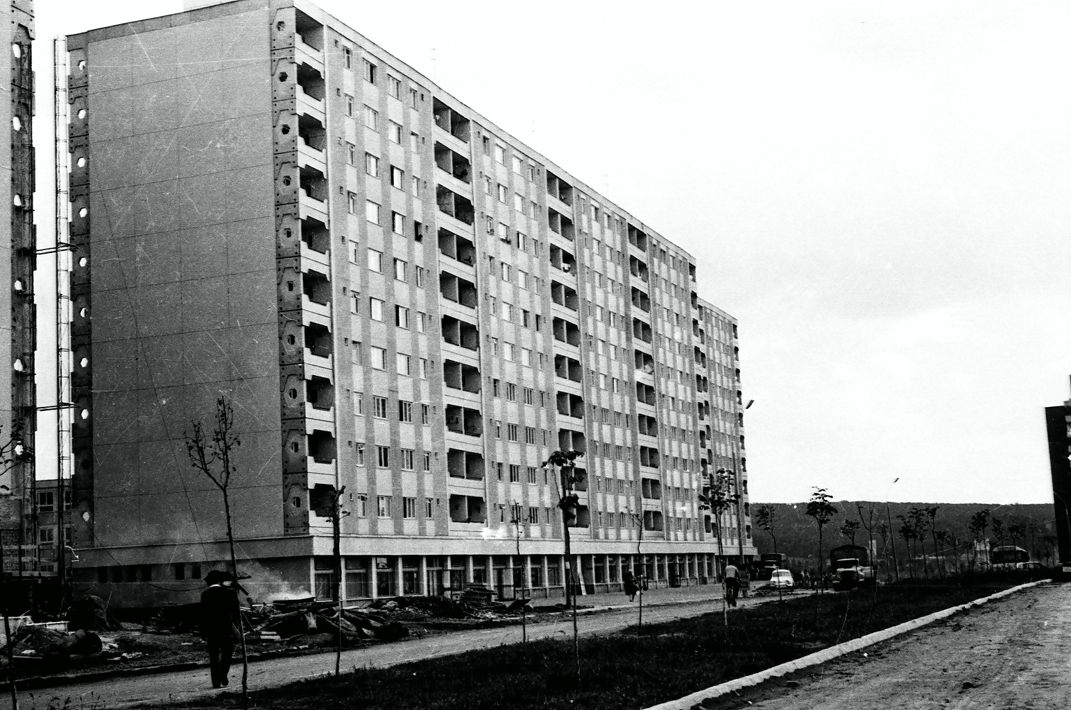 Kövesdomb mai arculata az 1970-es években keletkezett, amikor szocialista modell alapján alakították ki.